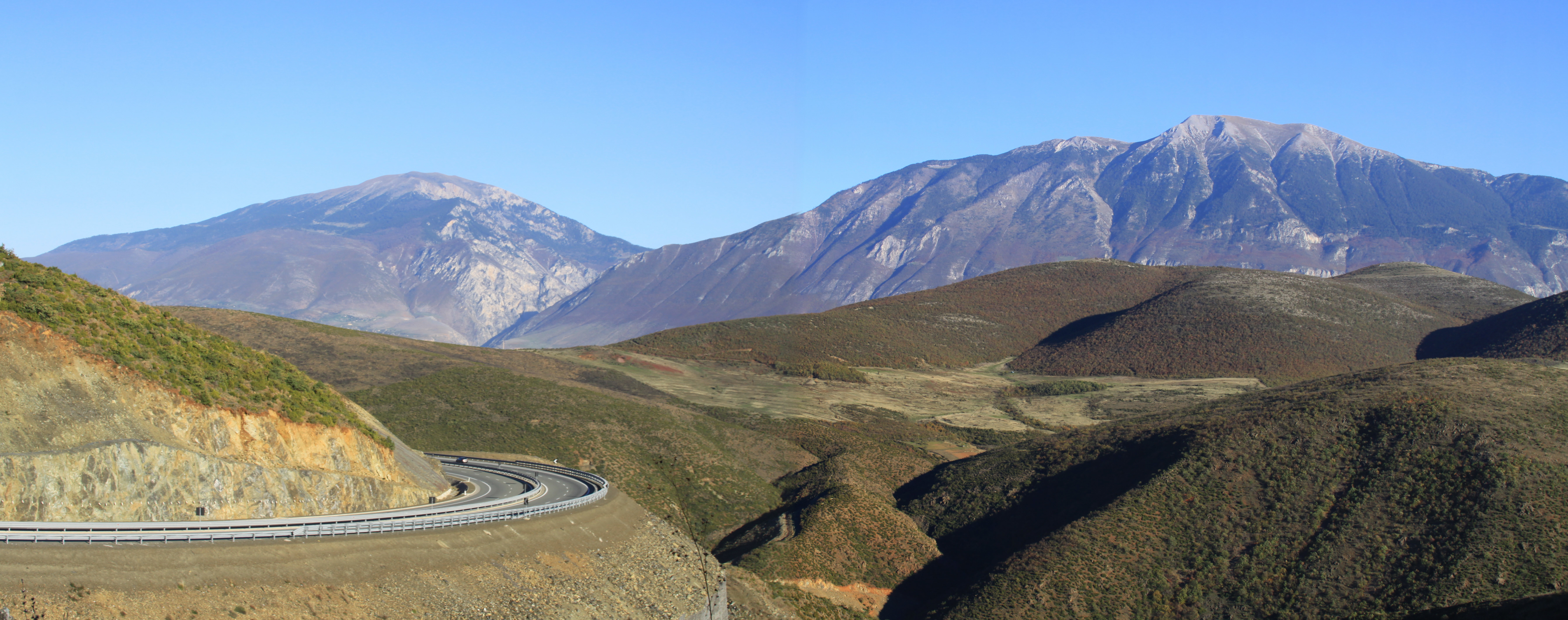 Mali Gjallica nga Kalimashi